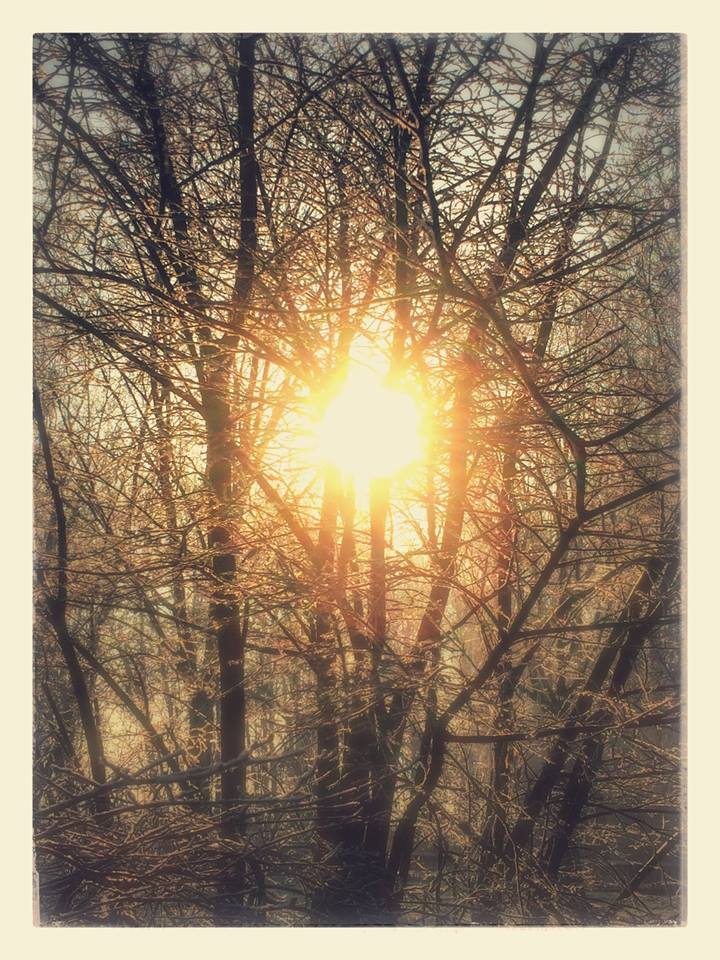 Zevenbansche Boezem, Meulendijks